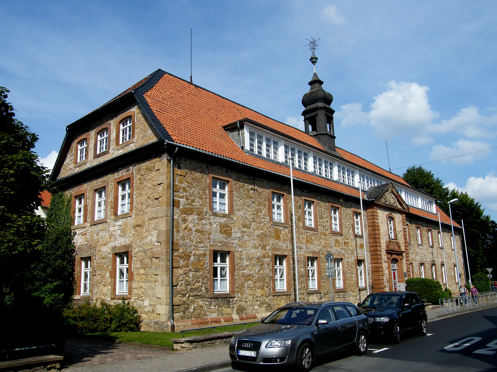 Korbach - ehem. Kloster - Alte Landesschule